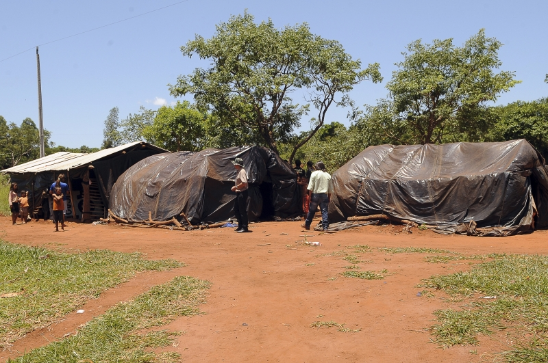 Rodovia MS-386 - Indígenas Guarani Kaiowá vivem em acampamentos precários e improvisados à beira da rodovia que liga as cidades sul-mato-grossenses de Amambaí e Ponta Porã